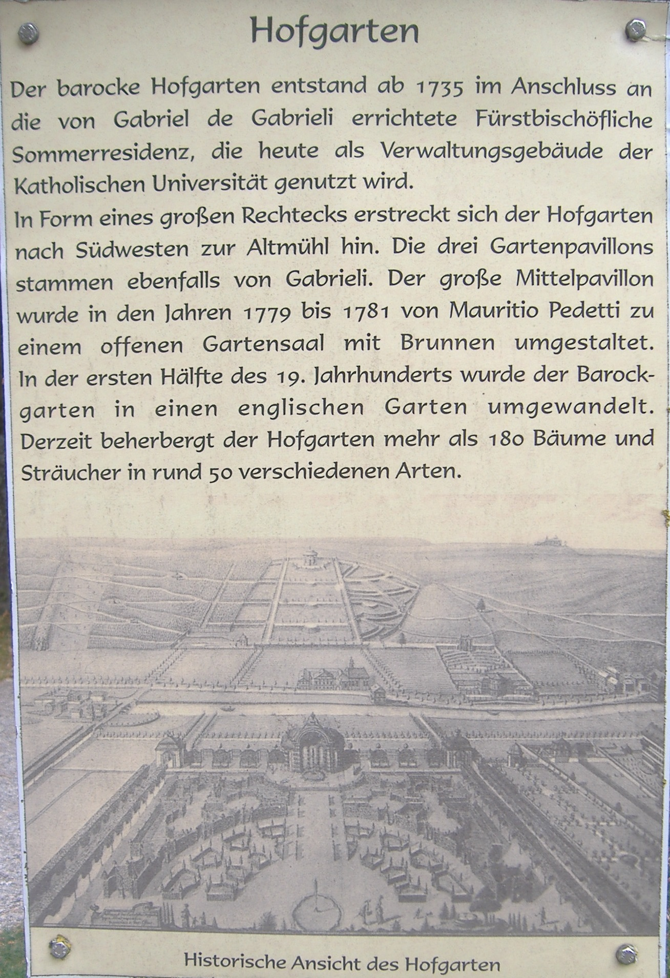 Infotafel am Eingang zum Hofgarten von Eichstätt